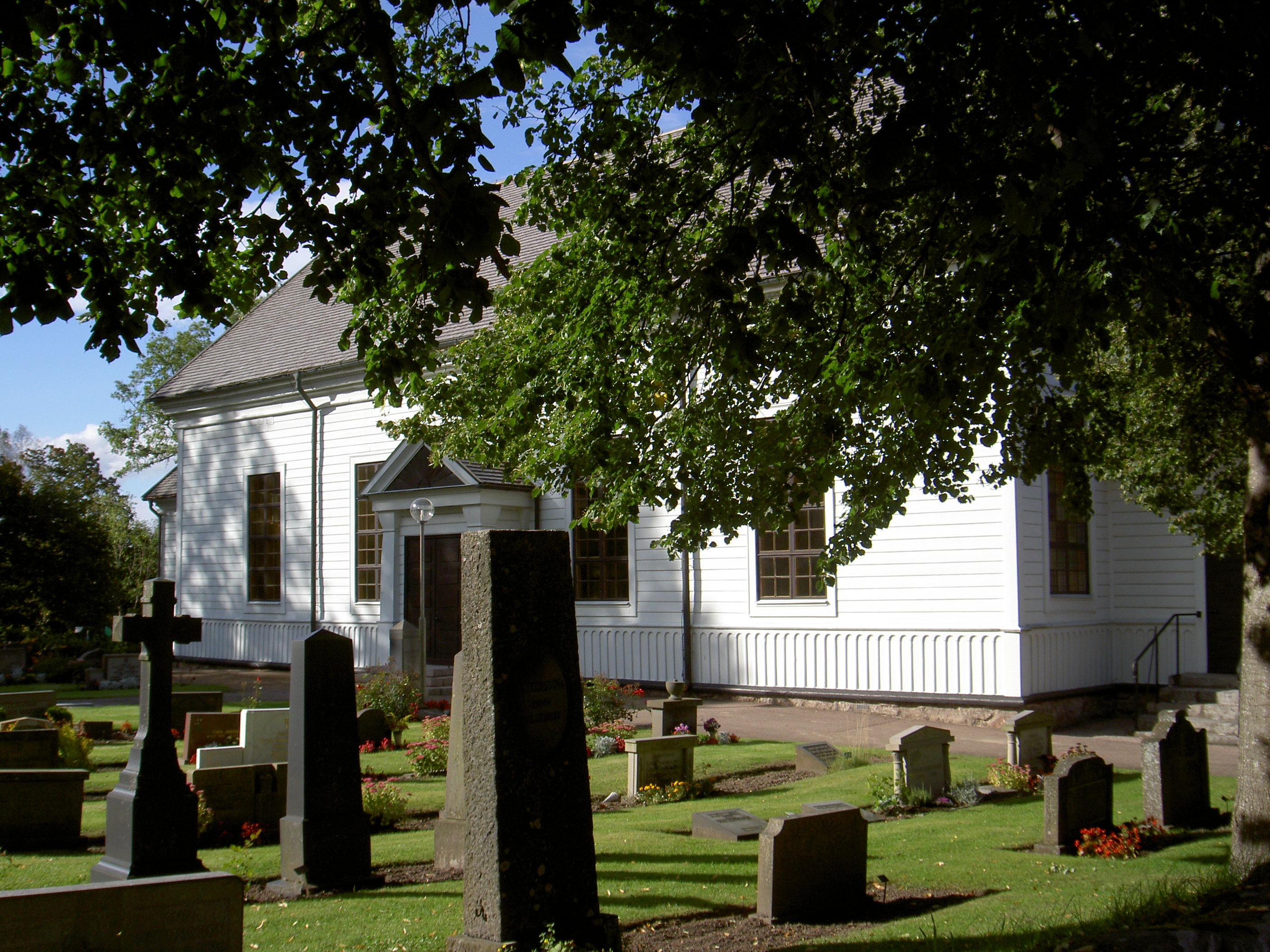 Karlslunda kyrka.